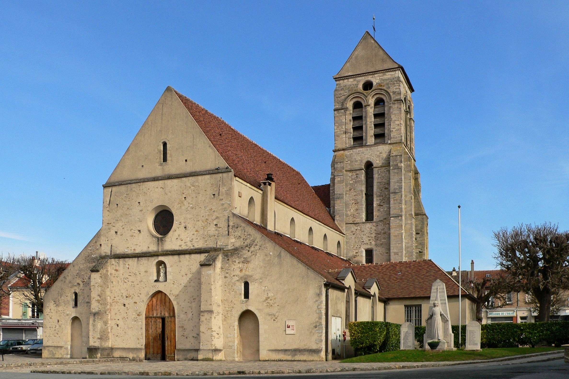 L'église de Sucy En Brie dans le Val de Marne